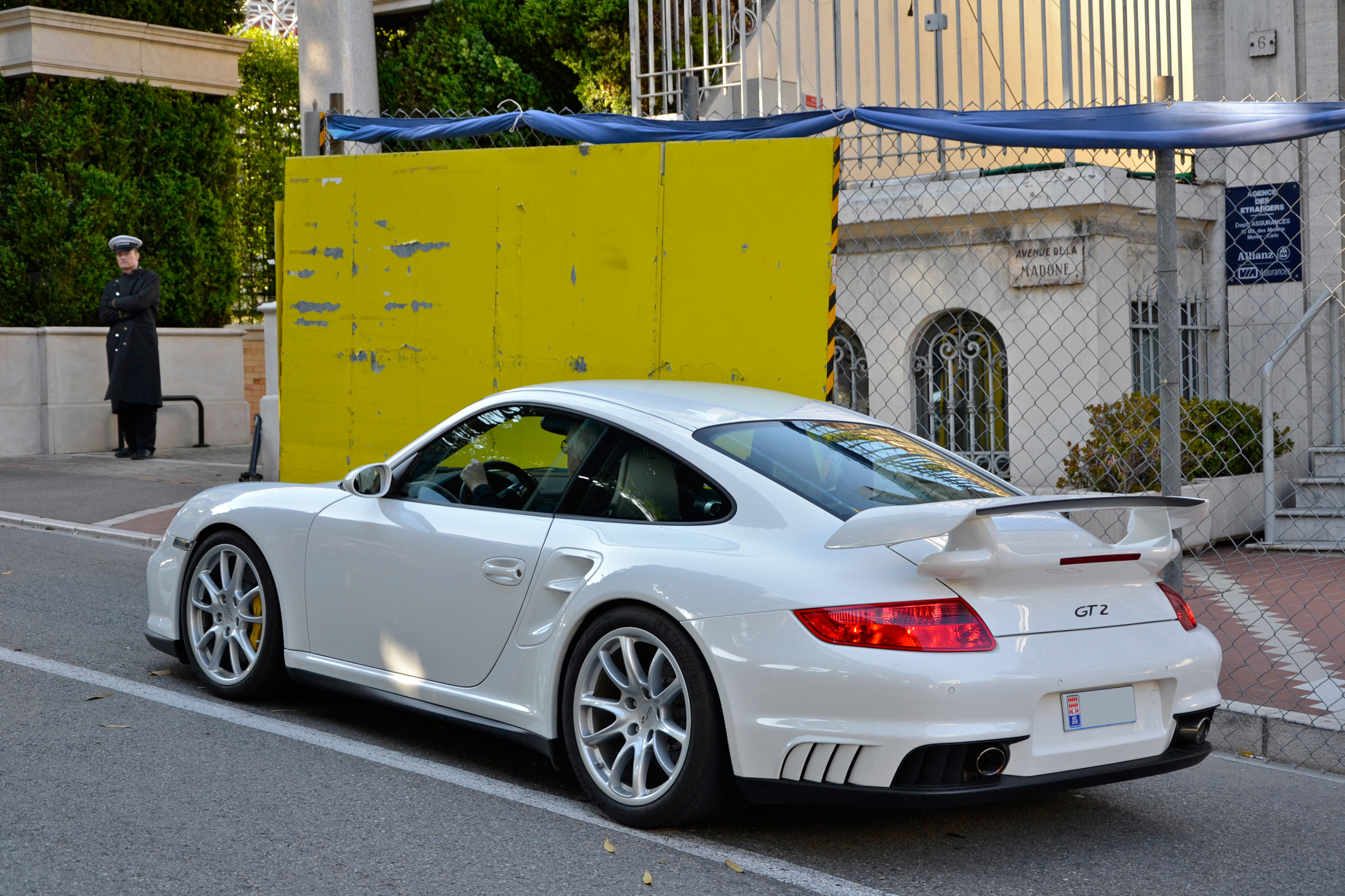 Porsche 911 GT2